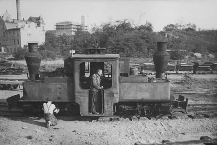 Vorwärts oder rückwärts? Das weiß sie selber nicht, die kleine Lok der Magdeburger Trümmerbahn. Sie hat zwar nur eine Feuerung, aber zwei Kessel, zwei Maschinenanlagen mit je zwei Zylindern, zwei Führerstände, und fährt vorwärts genau so gut wie rückwärts. Sie ist ein technisches Kuriosum und wird von allen Menschen bestaunt wie ein zweiköpfiges Kalb oder eine sechsbeinige Ziege. Aufn. Illus Biscan 5163-50 Mlk Jan.50 Information added by Wikimedia users. In Realität hat diese Lokomotive zwei Feuerungen, ein Kessel (d.h. ein Wasser- und Dampfraum) und ein Führerstand. Auf andere Seite des Kessels steht der Heizer.